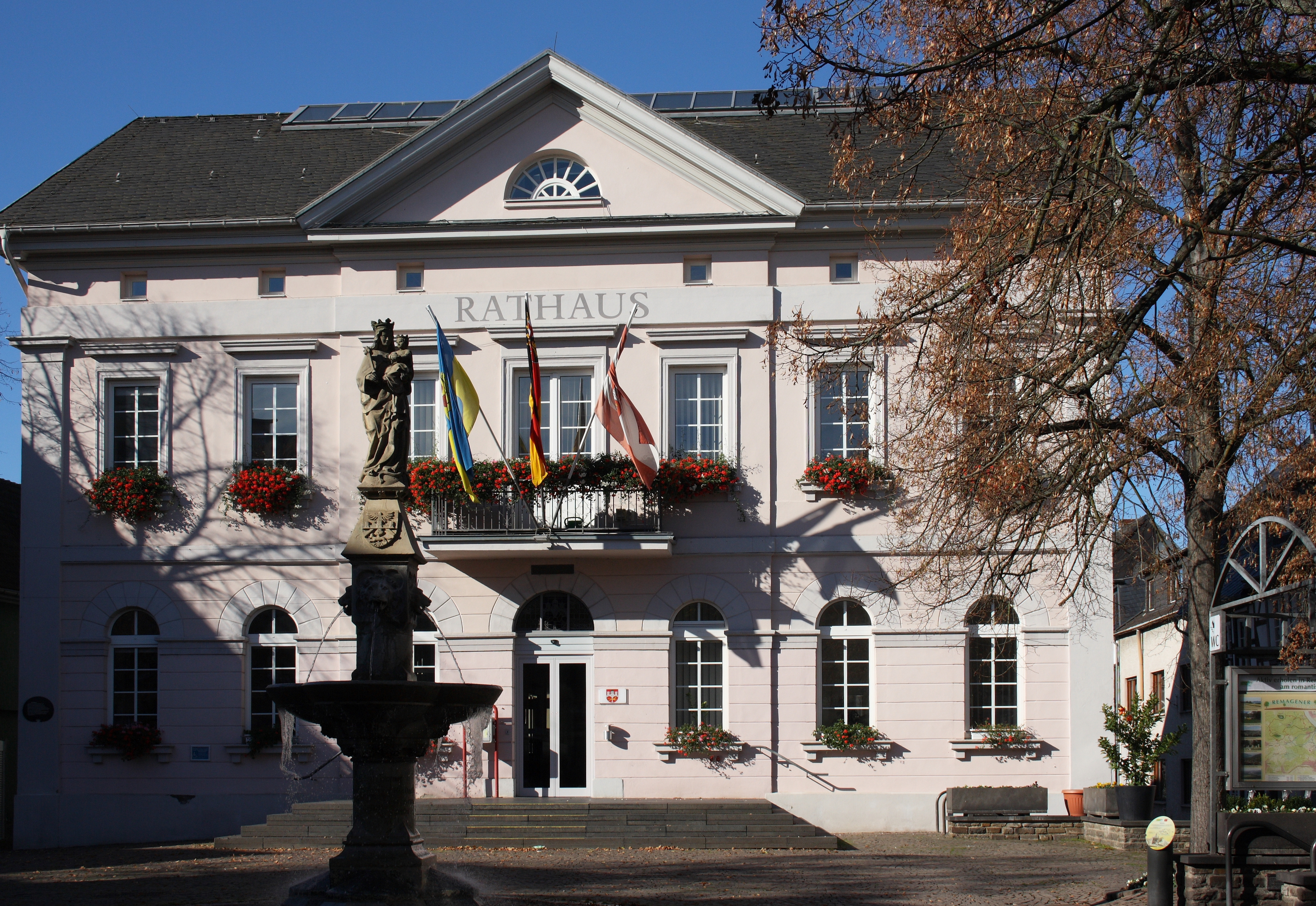 Rathaus in Remagen im Landkreis Ahrweiler (Rheinland-Pfalz), bezeichnet 1839